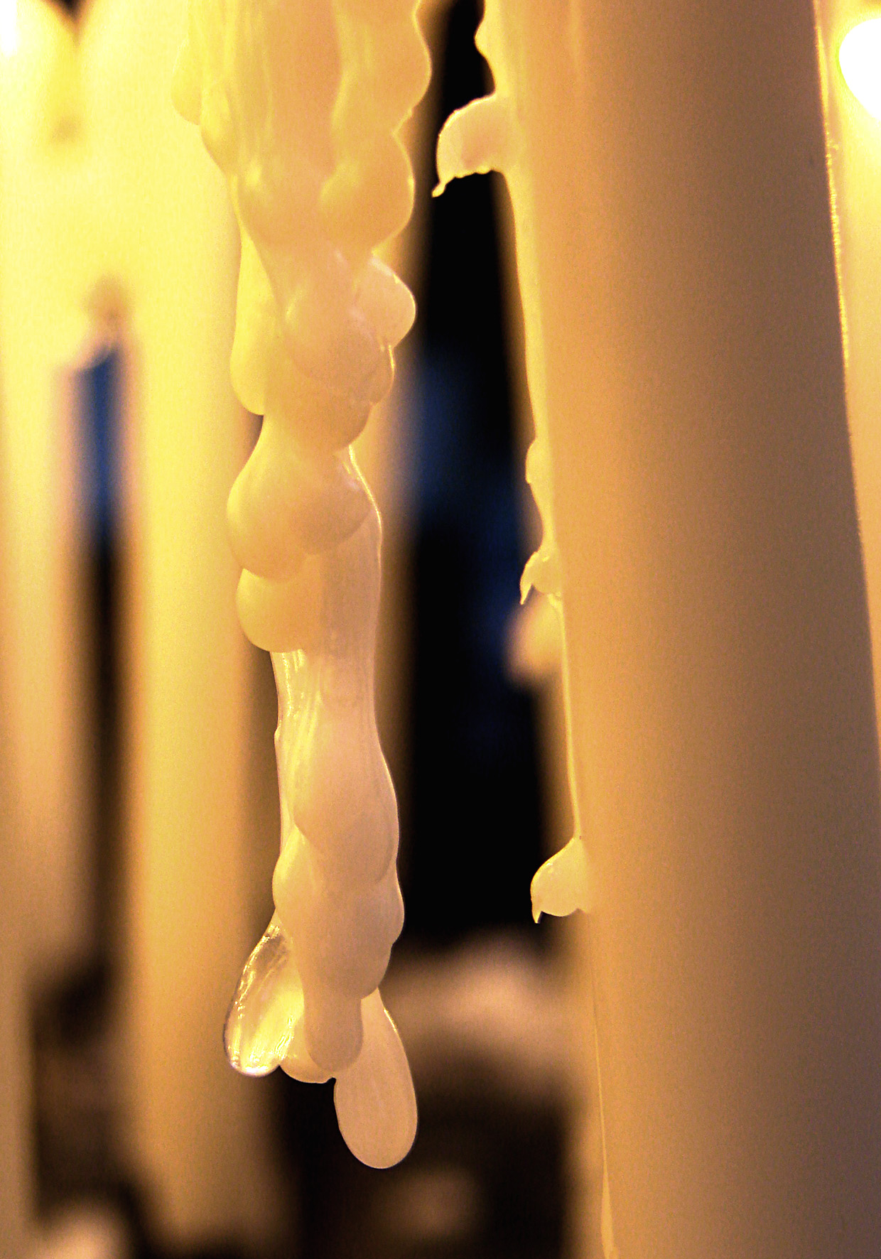 coulée d'un cierge dans une église.